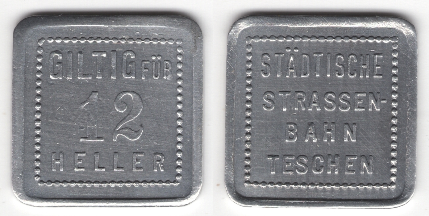 Aluminiowy żeton za 12 halerzy (dla dorosłych), Giltig für 12 Heller - Städtische Strassen-Bahn Teschen, Miejskie Tramwaje w Cieszynie 1911–1921